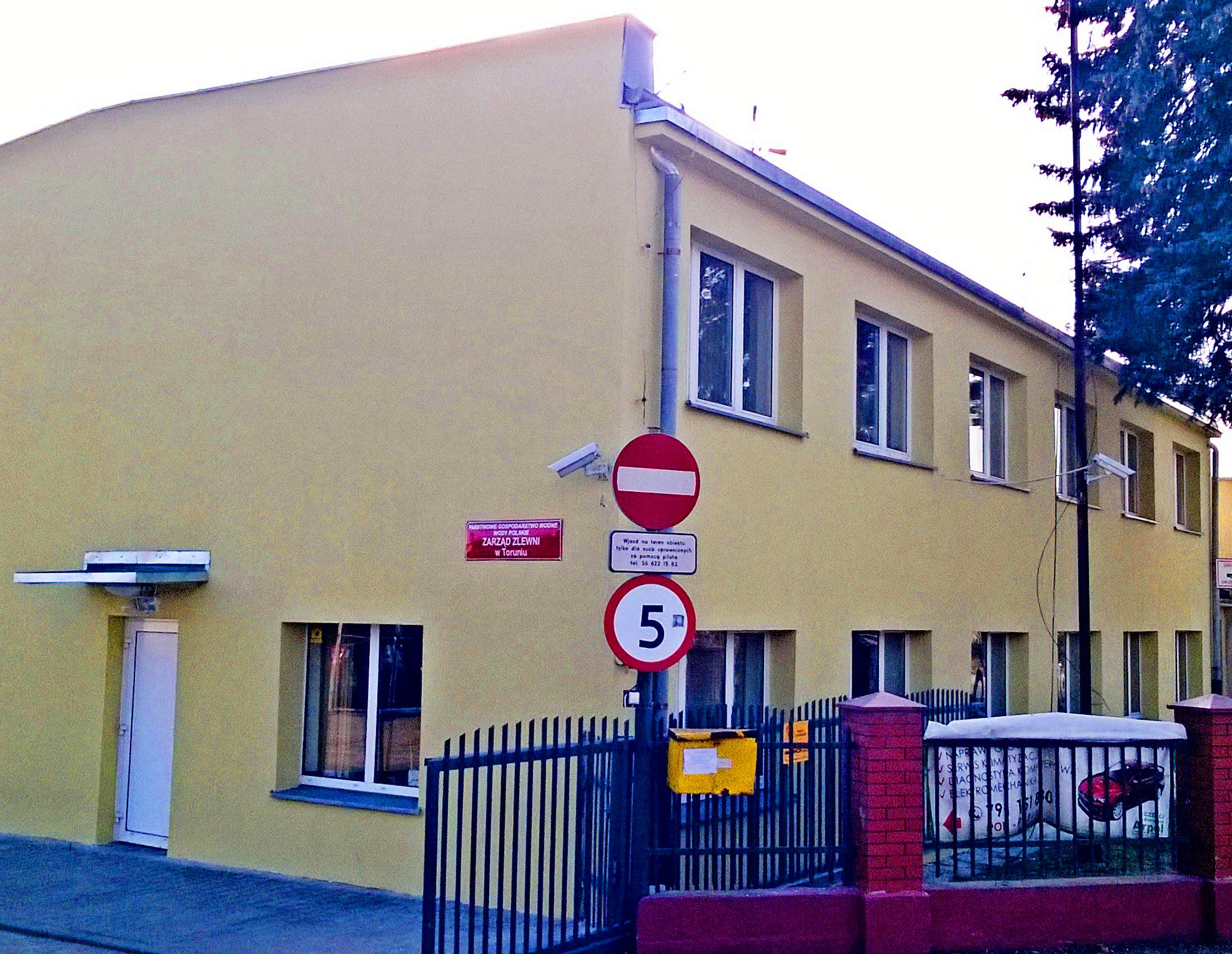 Budynek administracyjny Porto Zimowego w Toruniu